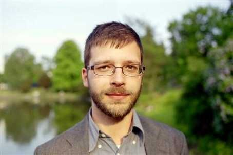 Bild på författaren Mats Kolmisoppi